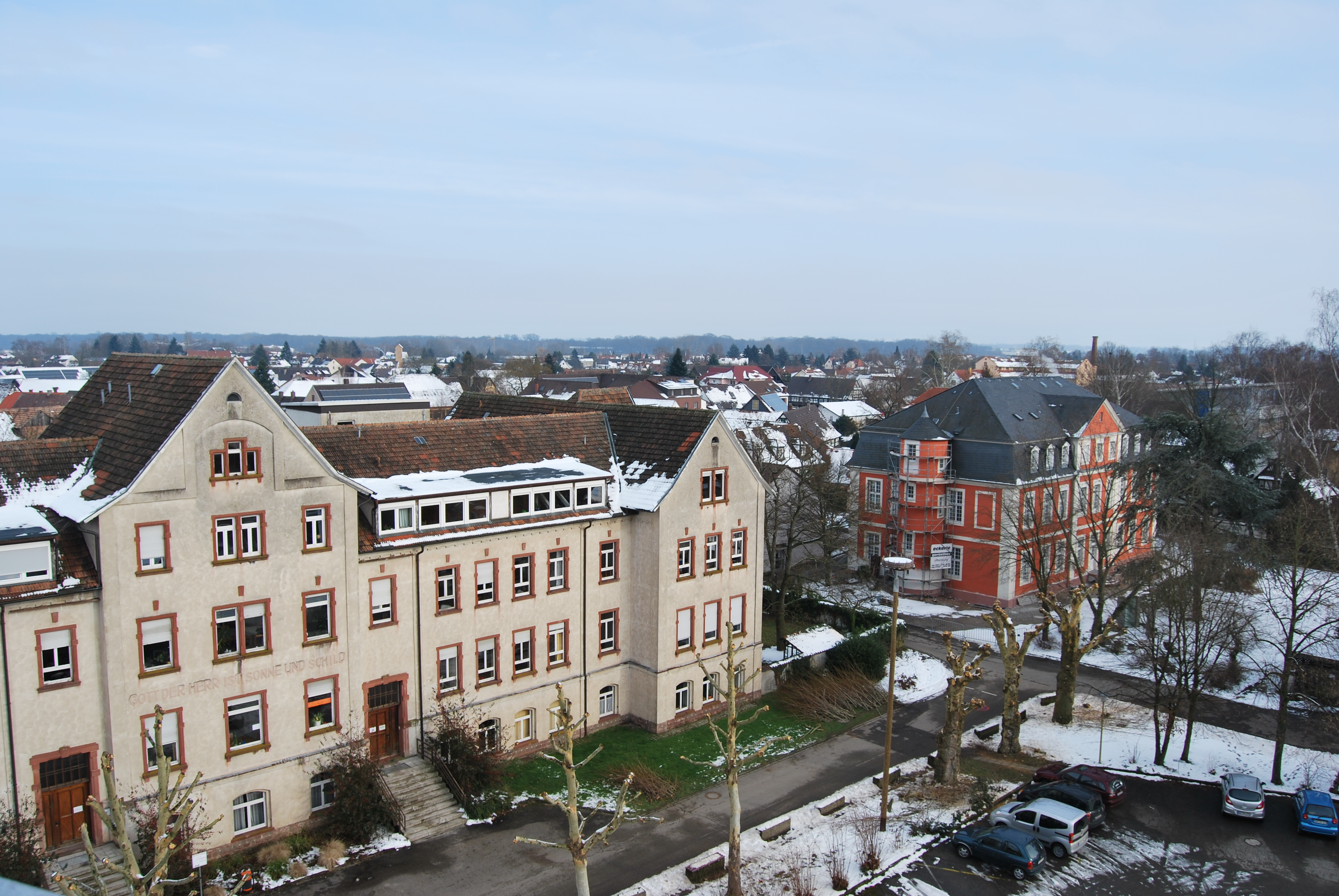 Epilepsiezentrum Kork